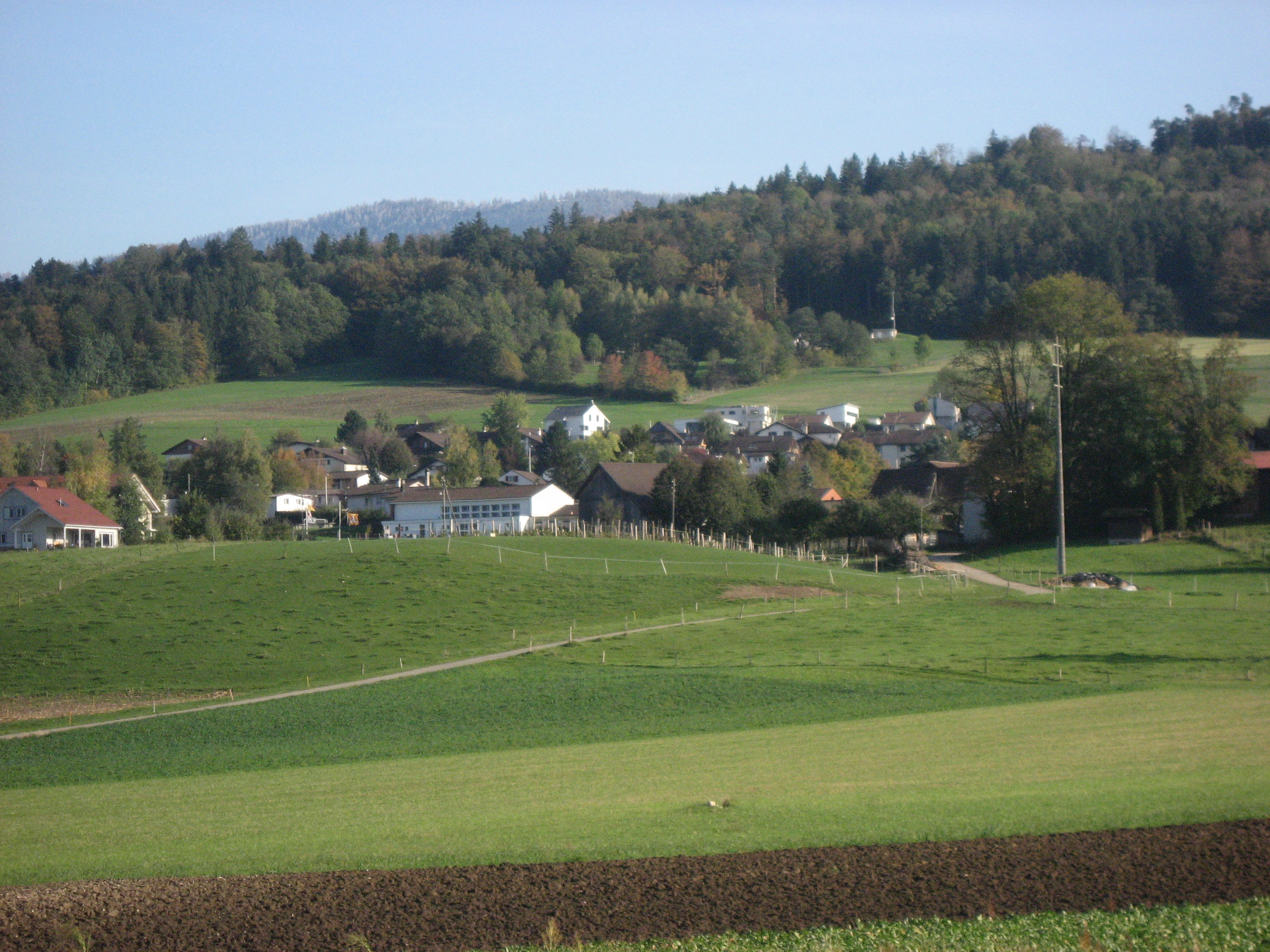 Vue de Rossemaison prise depuis la piste cyclable reliant Delémont et Courtételle